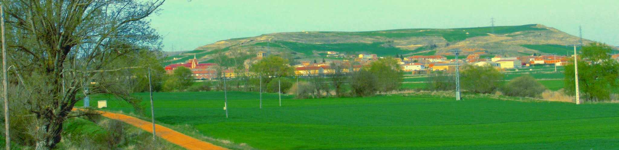 Vista de Tradajos, provincia de Burgos, Castilla la Vieja, España